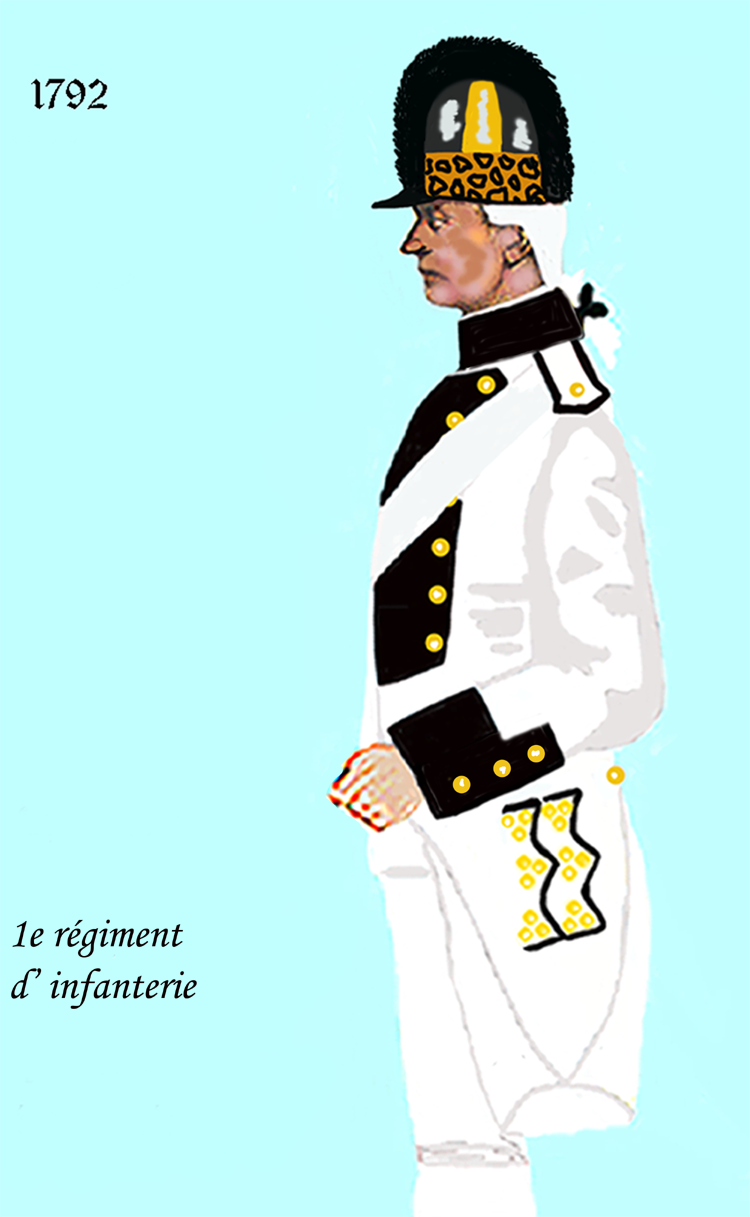 Uniform eines königlich französischen Infanterie-Regiments gemäß Dekret von 1792. - Entnommen und überarbeitet aus: „LES UNIFORMES ET LES DRAPEAUX DE L'ARMÉE DU ROI“ Marseille 1899.